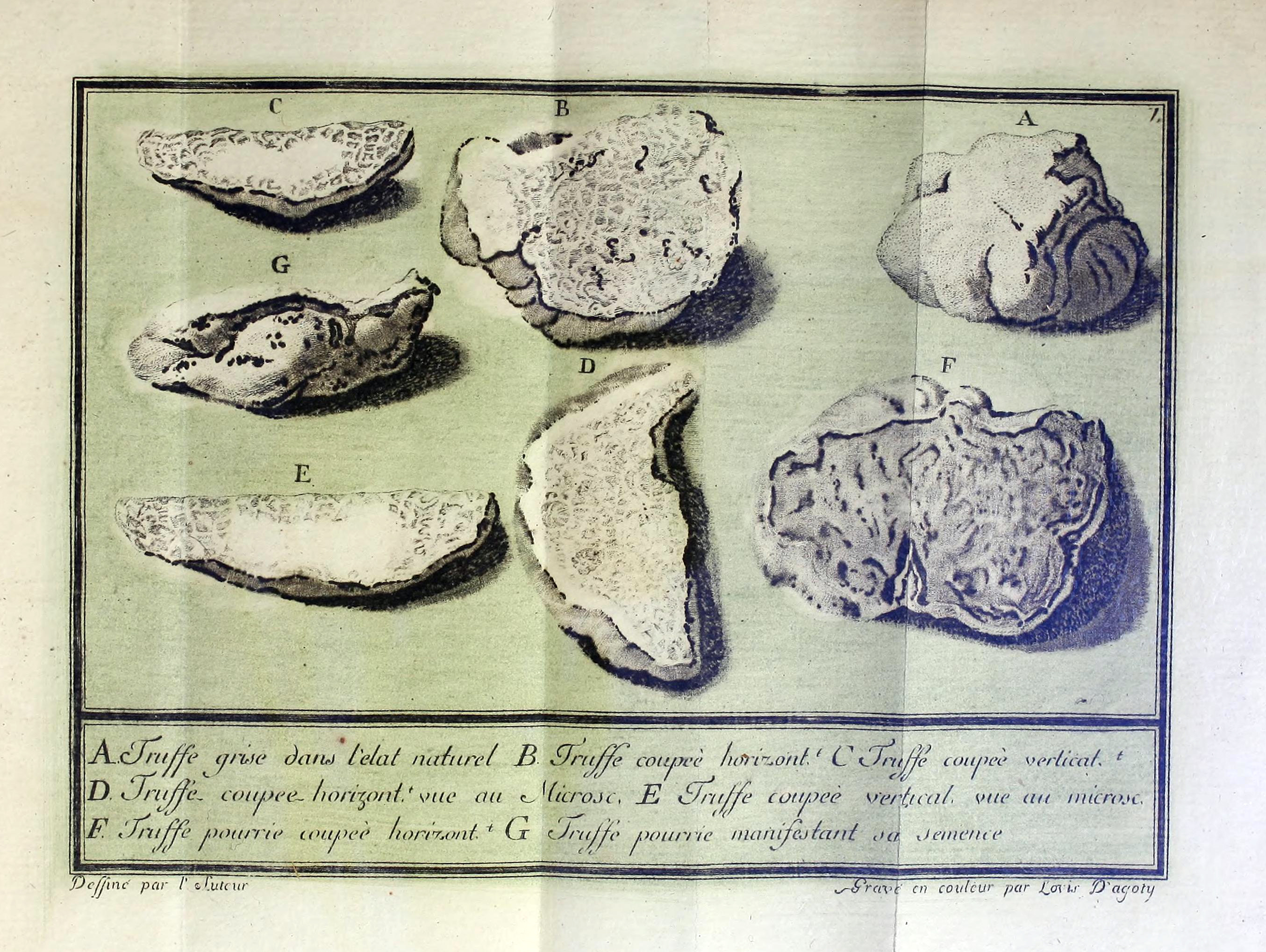 Planche des Lettres sur les truffes du Piémont